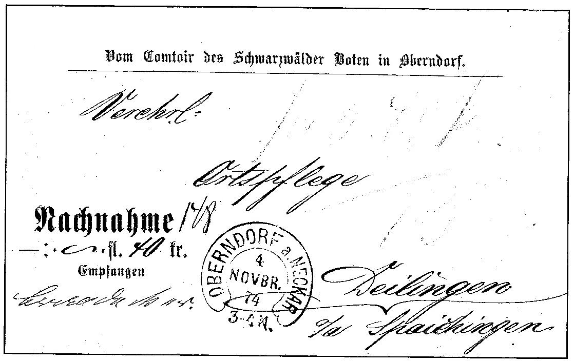 Frühe Nachnahmesendung aus Württemberg 1874 Aus einem alten Auktionskatalog kopiert W.Steven 18:01, 1. Nov. 2006 (CET)